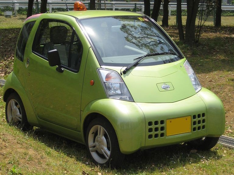 Nissan Hyper Mini.